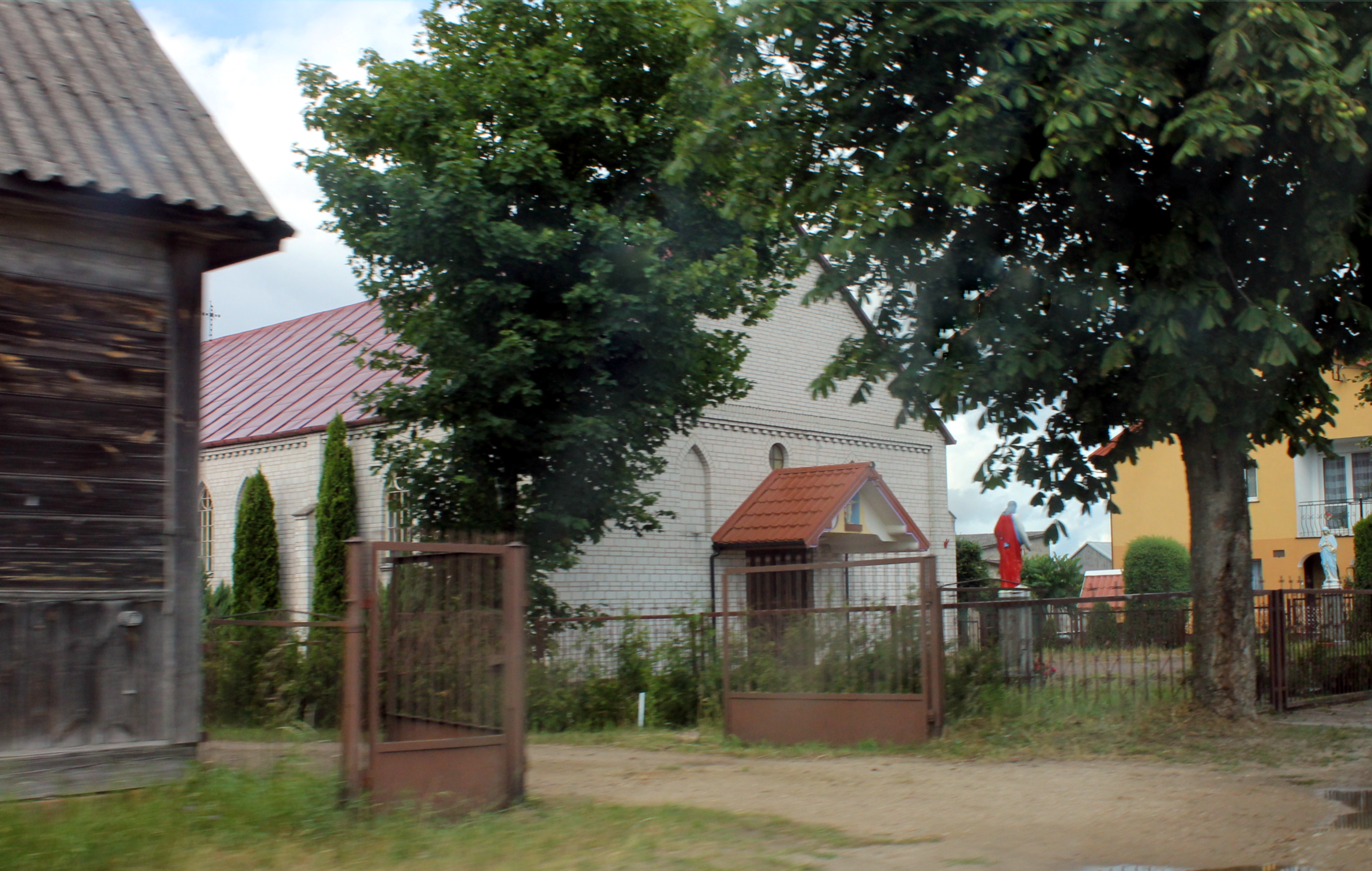 Kaplica we wsi Międzyleś, gm. Miedzna, woj. mazowieckie